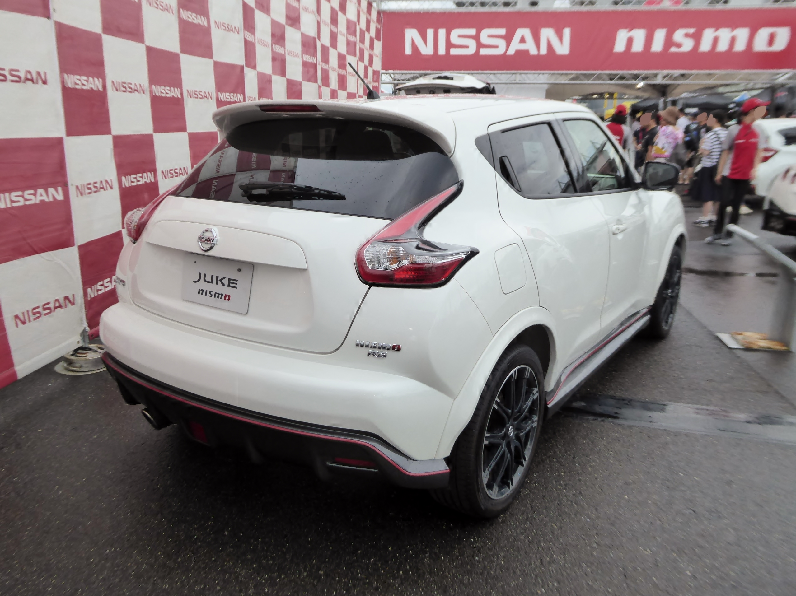 CBA-NF15型日産・ジュークニスモRSをリアから撮影。